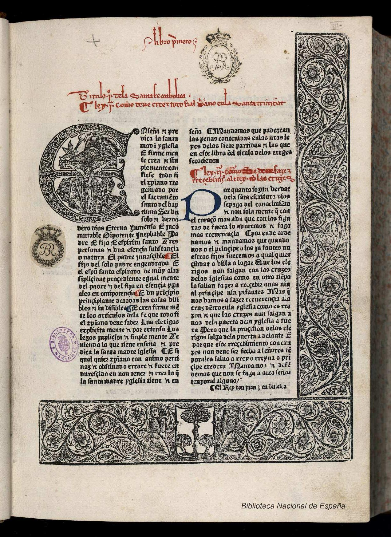 Ordenanzas reales de Castilla o Libro de las leyes Autor: Díaz de Montalvo, Alfonso (1405-1499) Fecha: 1484 Datos de edición: En la çibdad de Huepte [Alvaro de] Castro (Castro, Alvaro de)